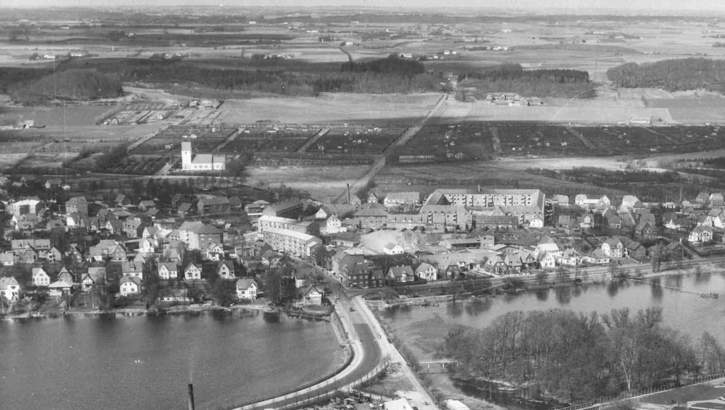 Alderslyst, Silkeborg